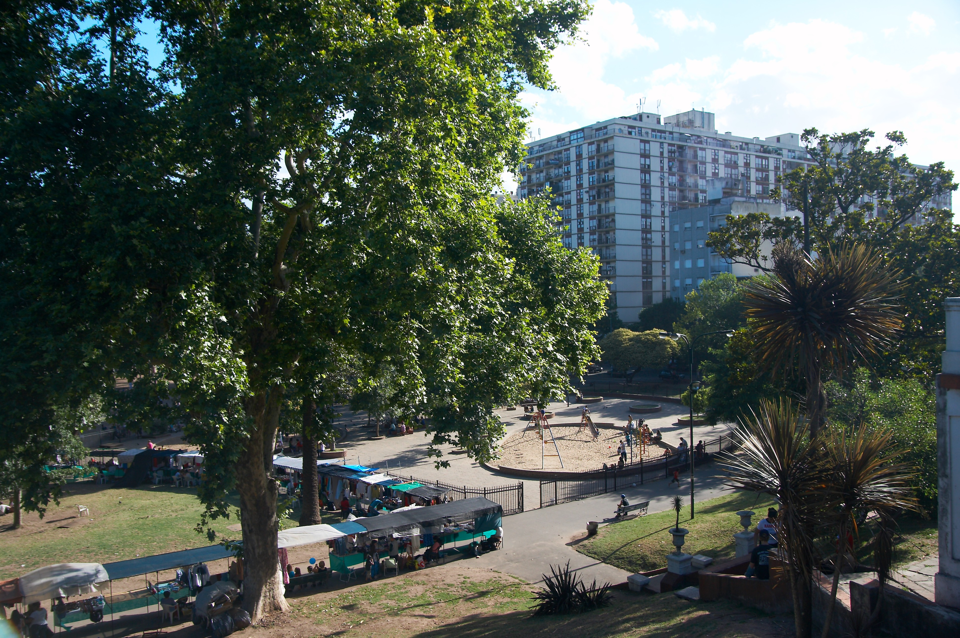 Parque Lezama, barrio de San Telmo, Buenos Aires, Argentina.